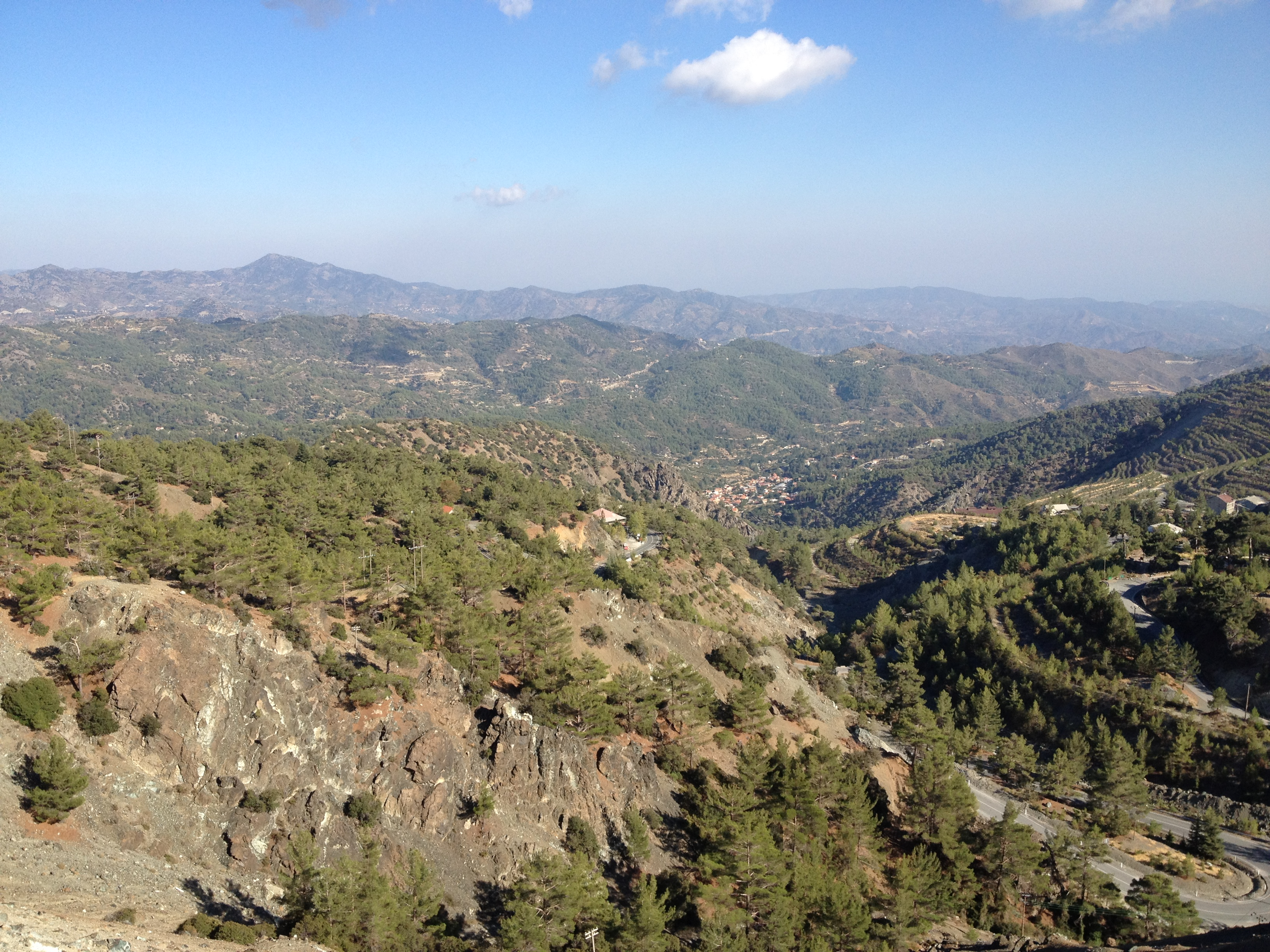 Near Trodos, Cyprus